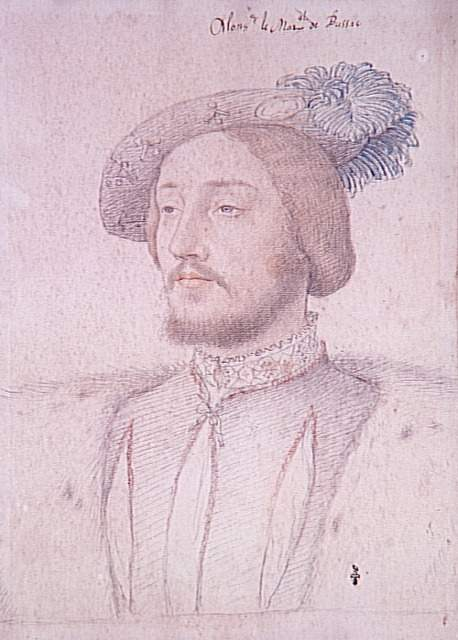 Charles I. de Cossé, comte de Brissac (1505-1563), Marschall von Frankreich